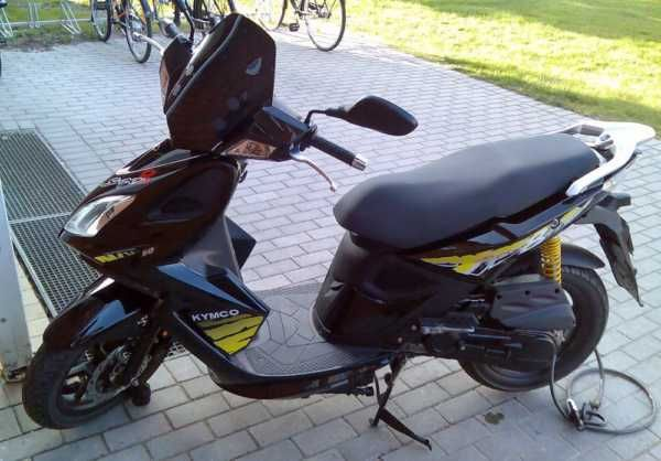 Kymco Super 8 50 ccm 4 takt scooter i sort.